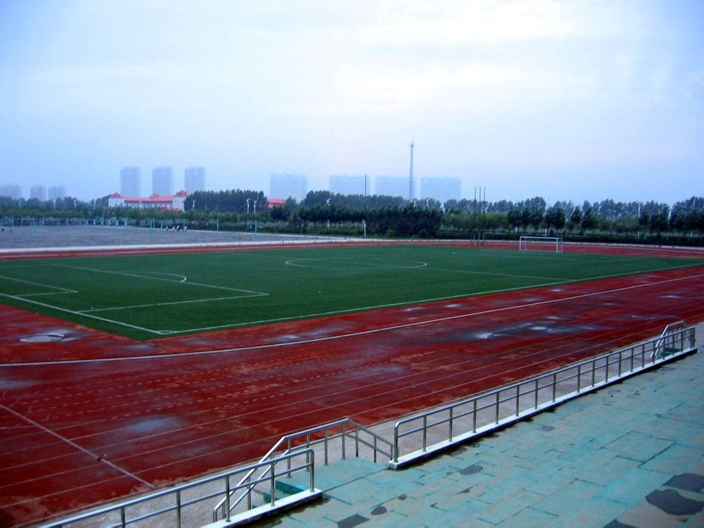 实验中学的足球场，每年都会有实验杯足球赛